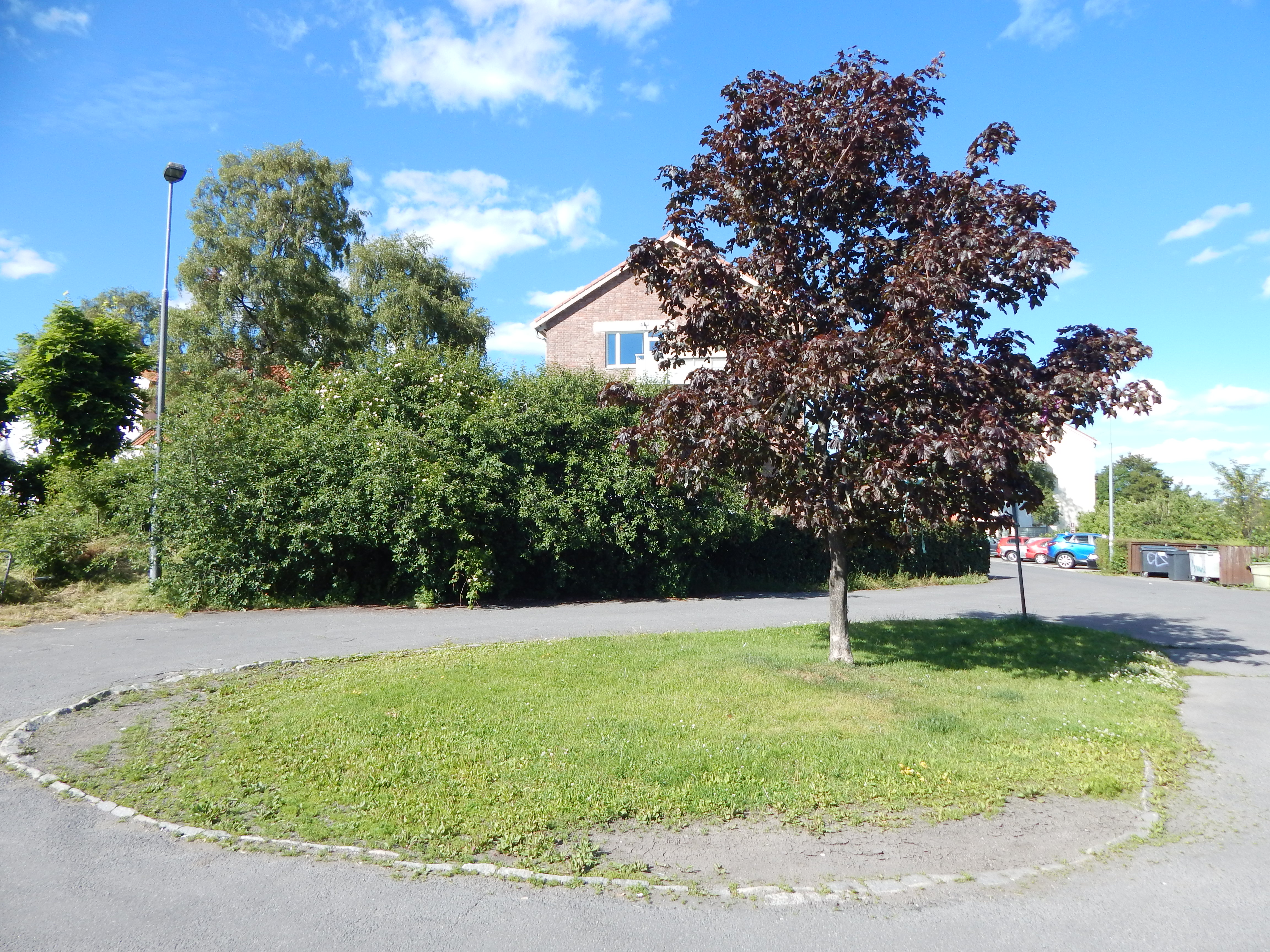 Snuplasen innerst i Eindrides vei, ved Hasle kirke